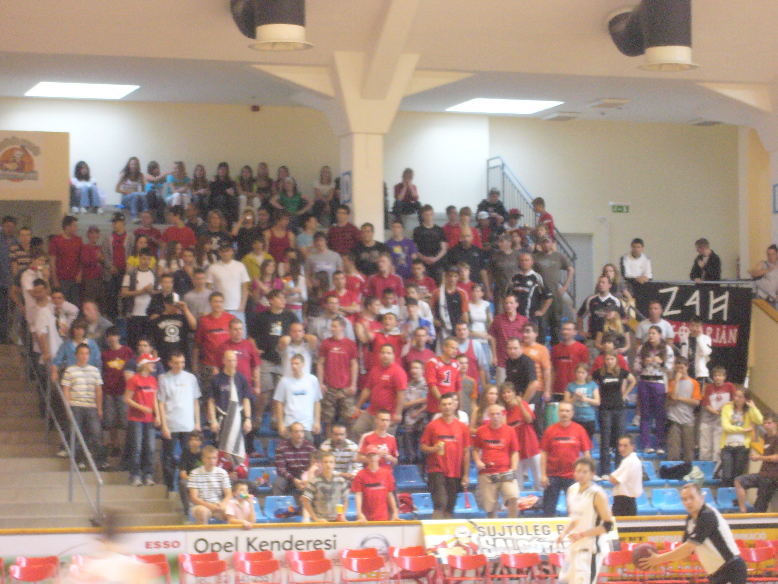 Hazai B-közép a Wamsler SE Salgótarján kosármeccsén Salgótarjánban